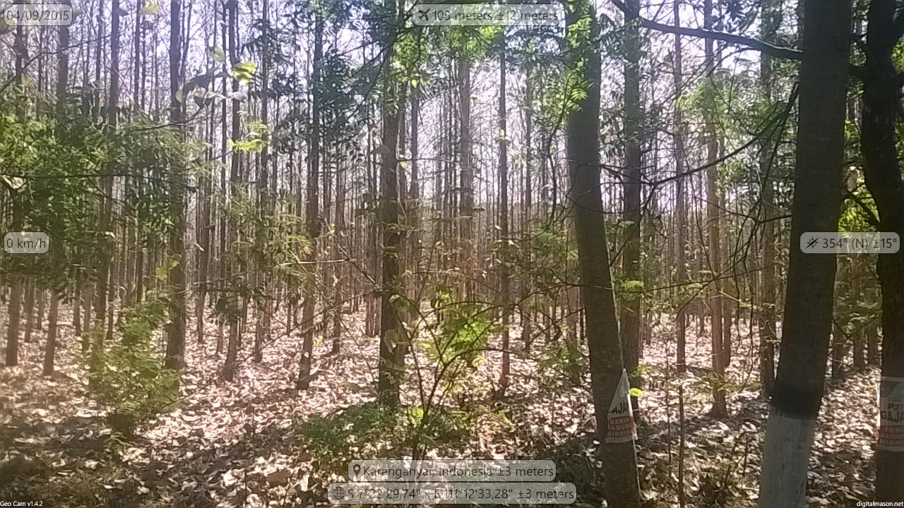 Hutan di kawasan Perhutani yang berada di Desa Kauman